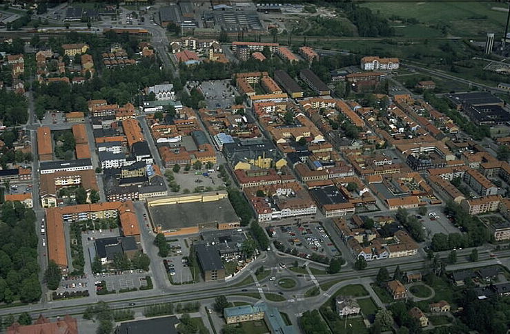 Motiv: Sala Nyckelord: Flygbilder, Riksintressen Kategori: StadsmiljöSala